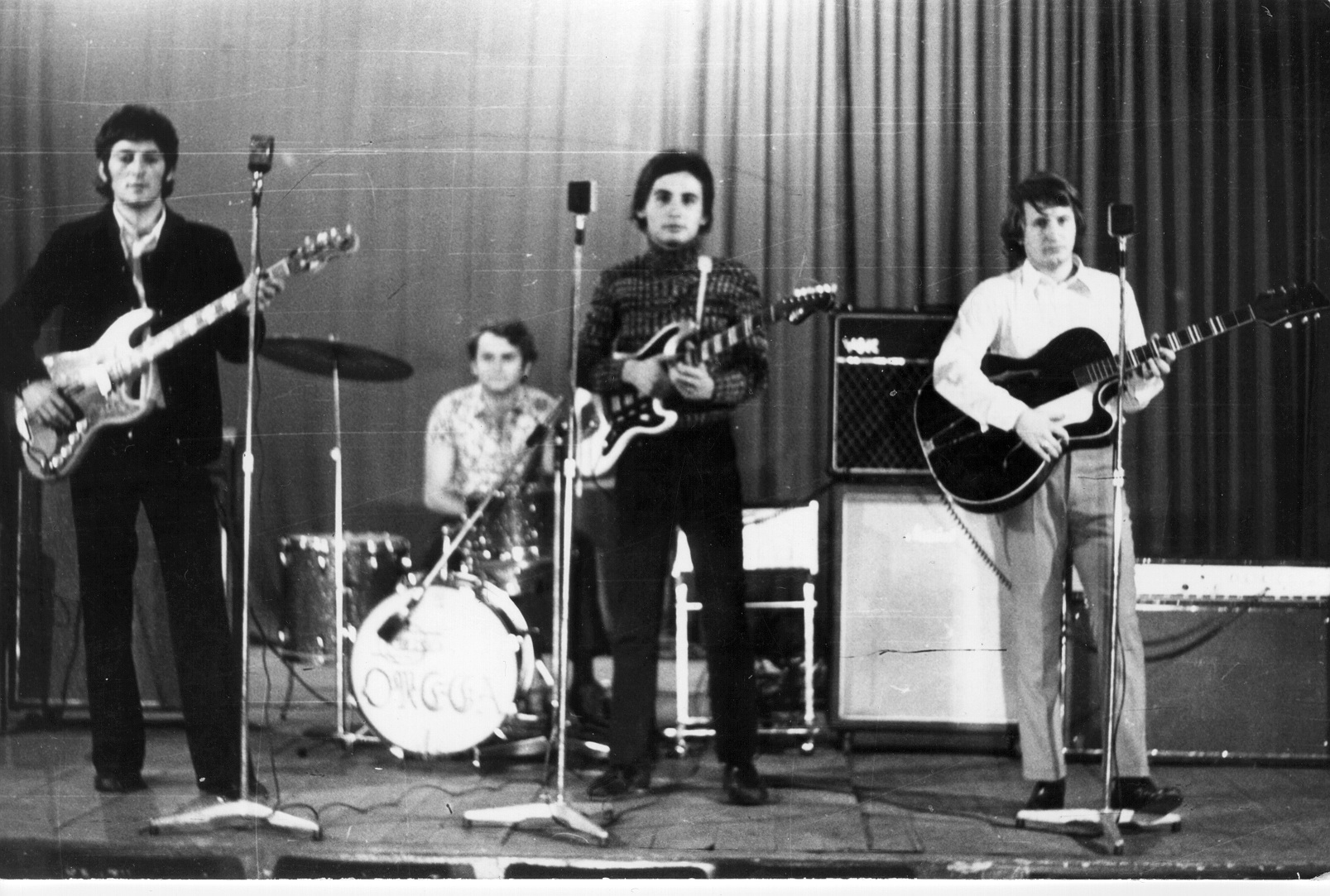 Srpski (latinica): VIS Omege II postava Dom omladine Zrenjanin